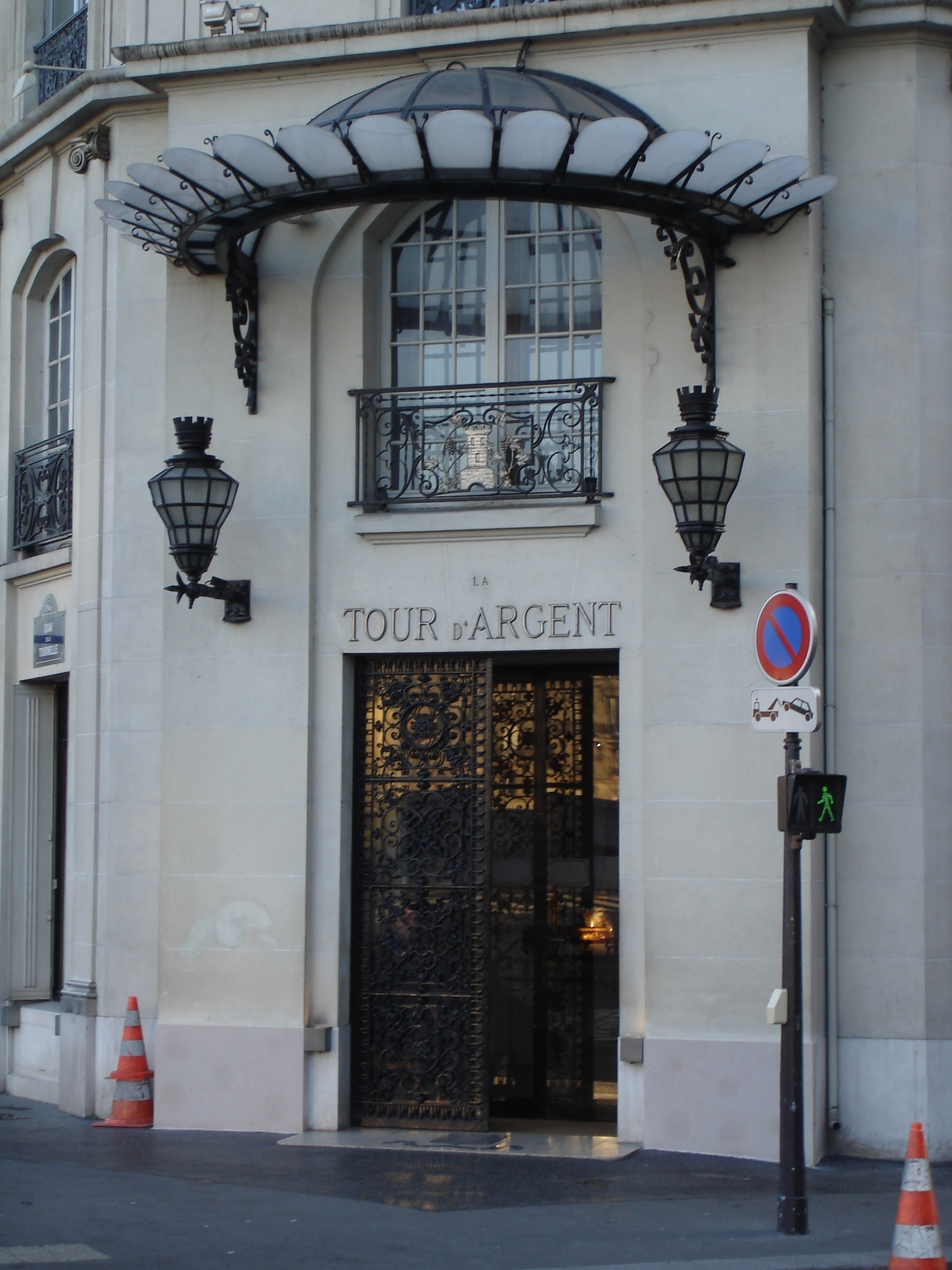 Restaurant "La Tour d'Argent", Rue du Cardinal Lemoine; Main entrance